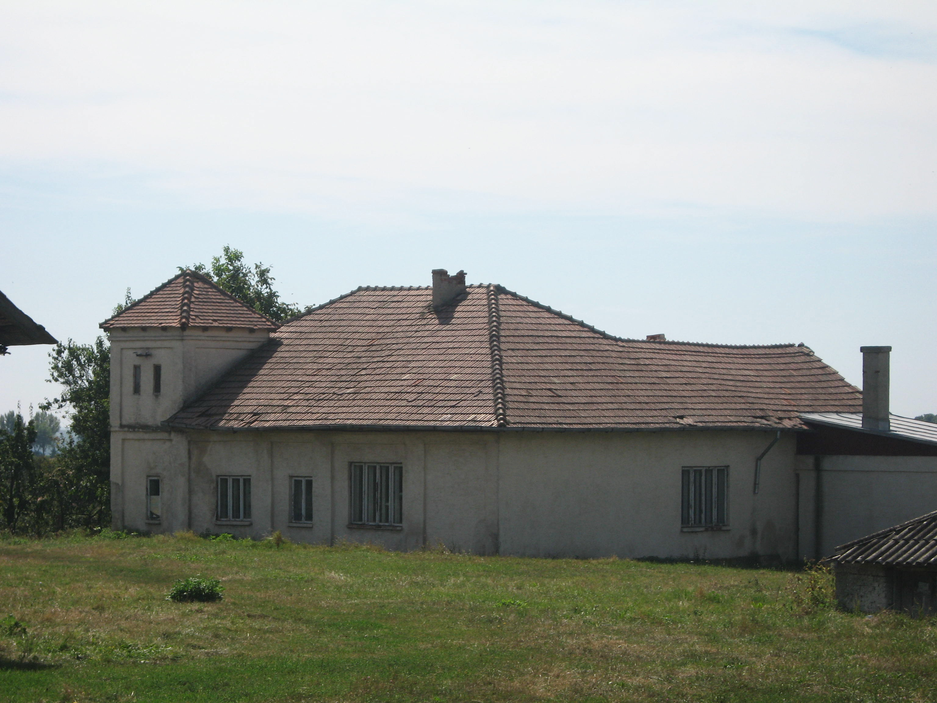 Conacul din Guranda, Botoșani County, Romania